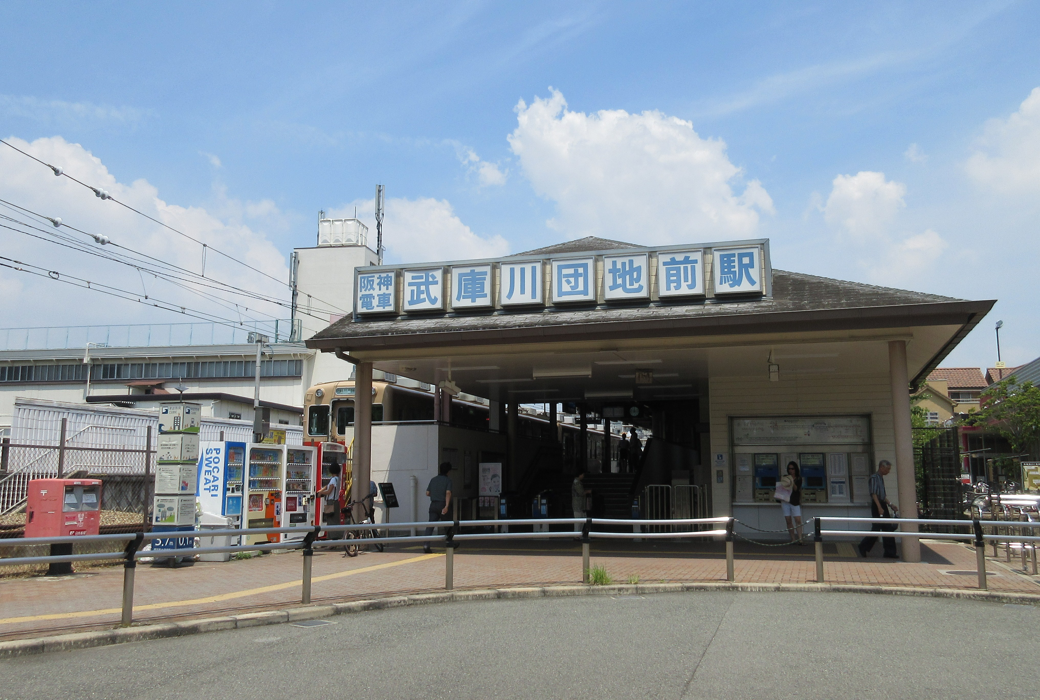 阪神電鉄武庫川団地前駅